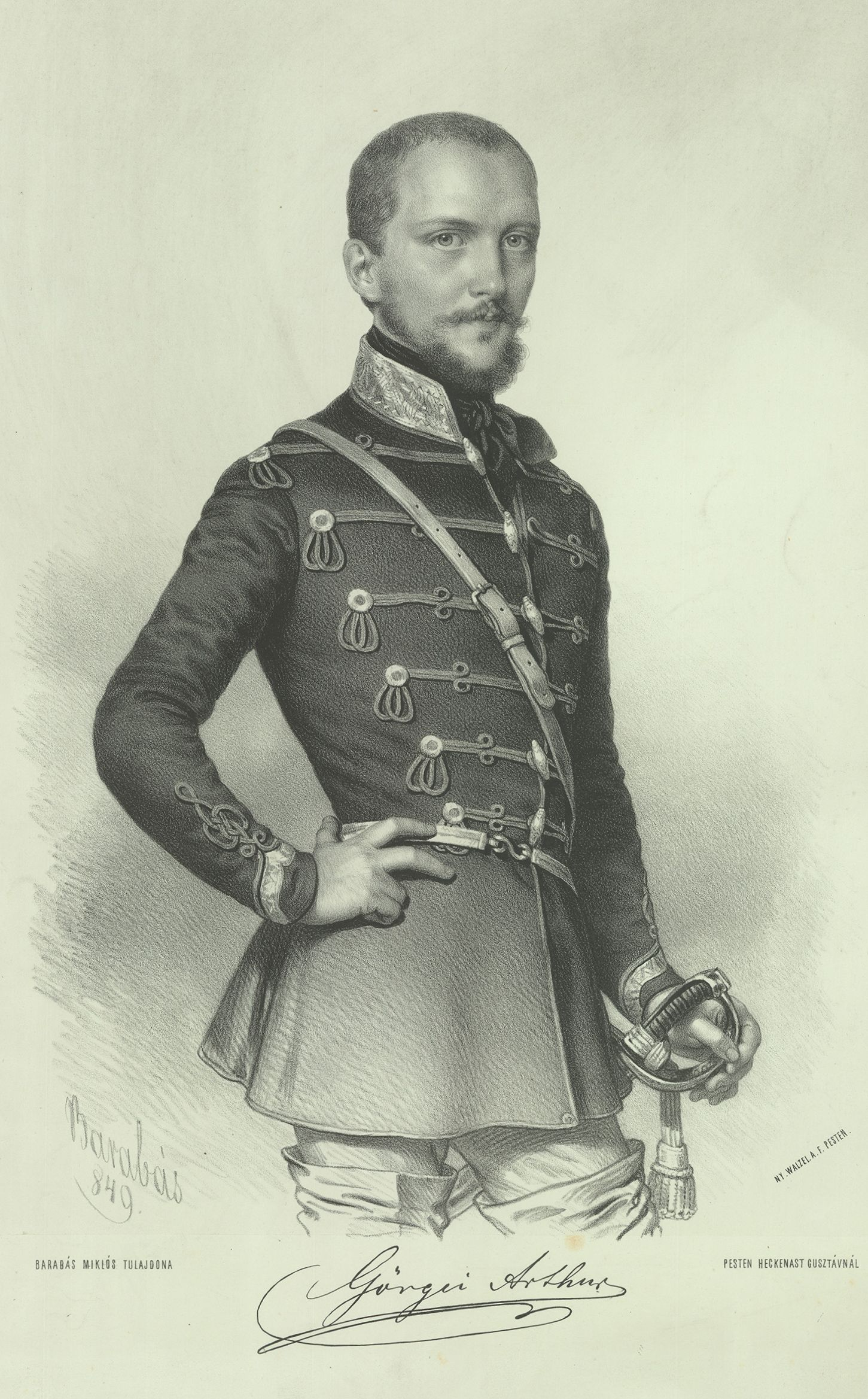 Görgei Artúr 1848–49-es honvédtábornok, hadügyminiszter, fővezér Barabás Miklós metszetén